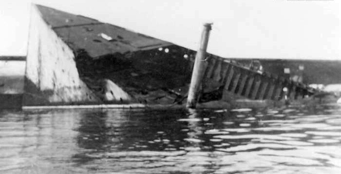 La portaerei Sparviero affondata dai tedeschi nel settembre 1944 davanti all'imboccatura del porto di Genova per ostruirne l'accesso alle navi alleate. Verrà rimossa due anni dopo.